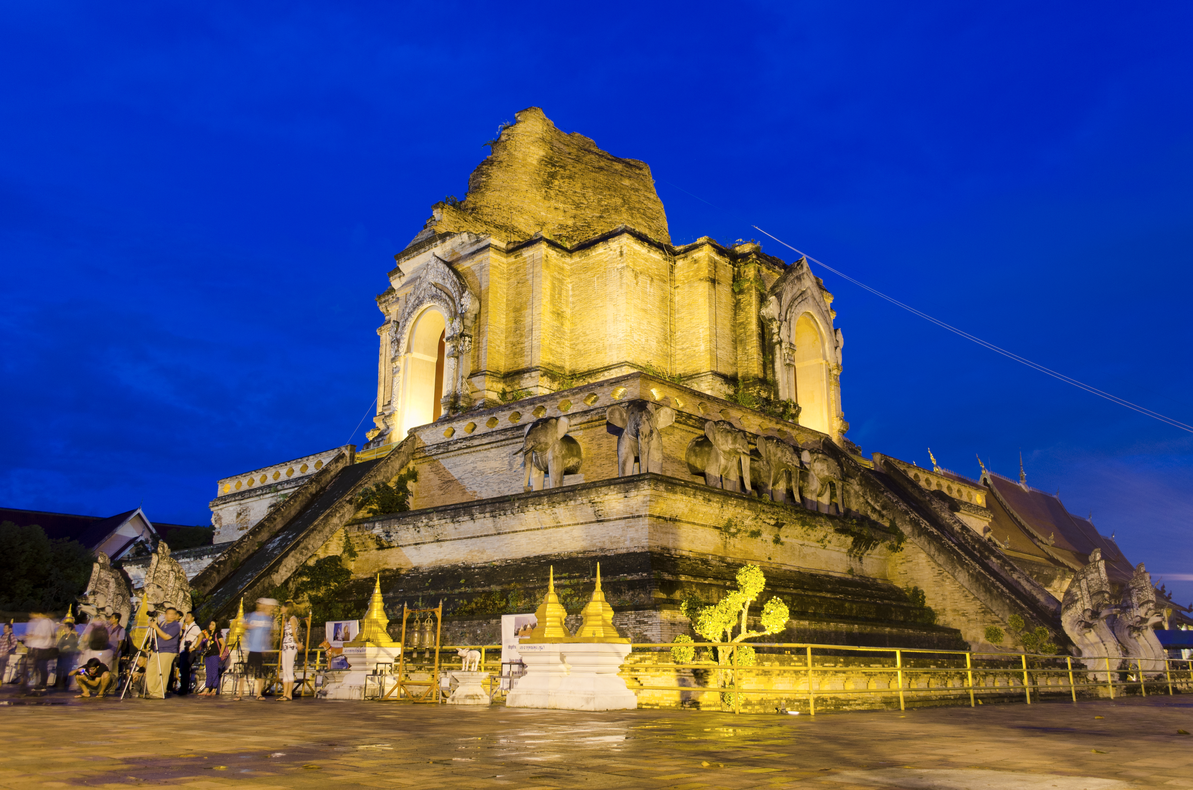 วัดเจดีย์หลวง